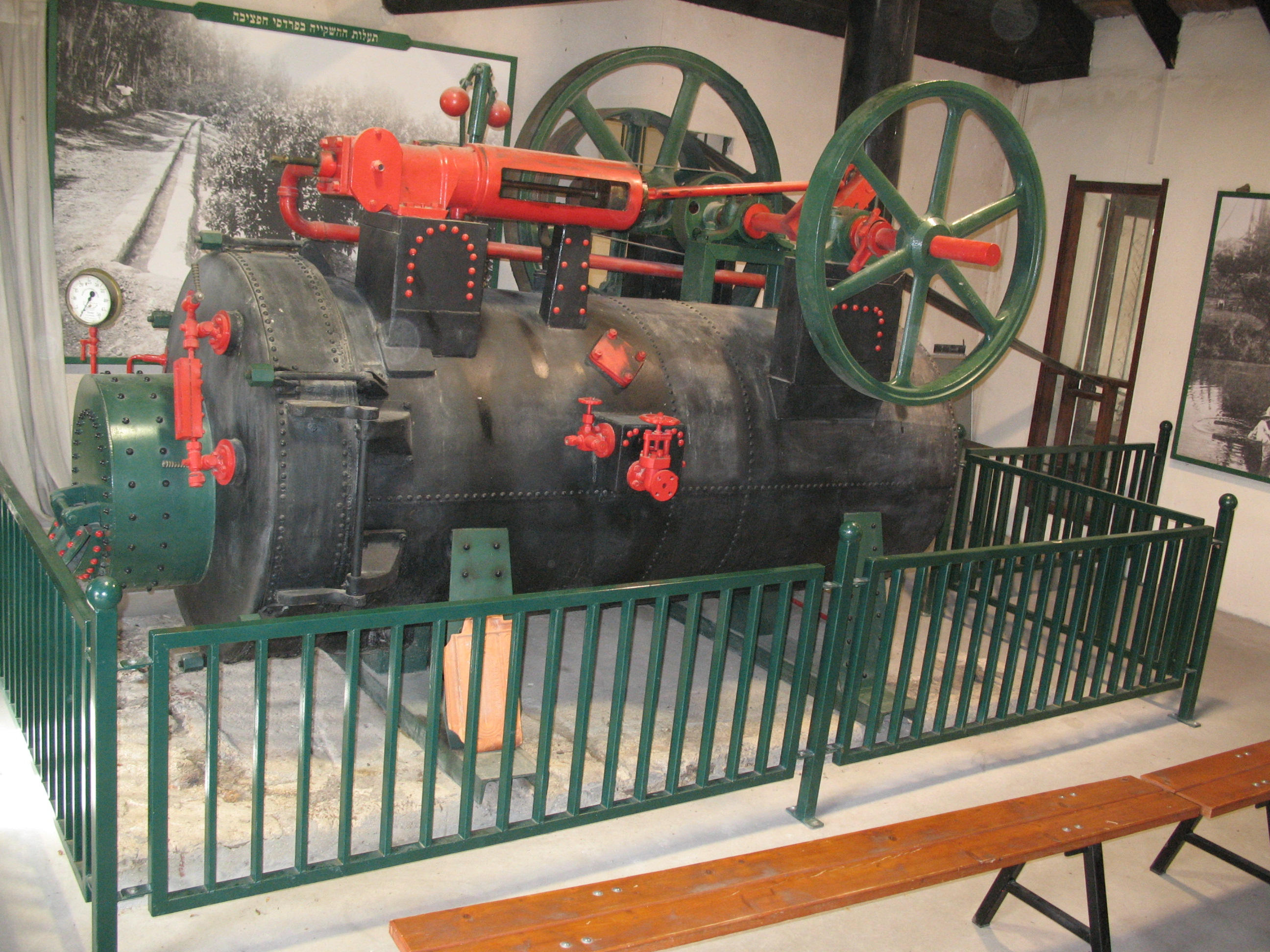 Steam engine in Hefziba